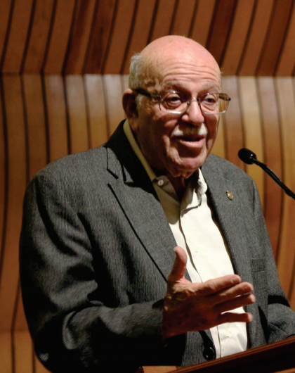 ESFM_IPN